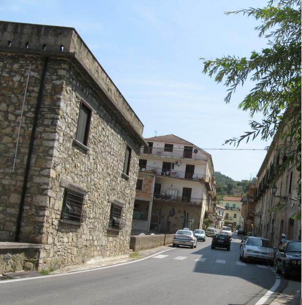 Via Roma in Albanella. Sulla destra si scorge lo storico Palazzo della famiglia Capozzoli-Rizzi, antichi latifondisti locali. Sulla sinistra, nel palazzo bianco, l'abitazione del pittore Pasquale Spinelli